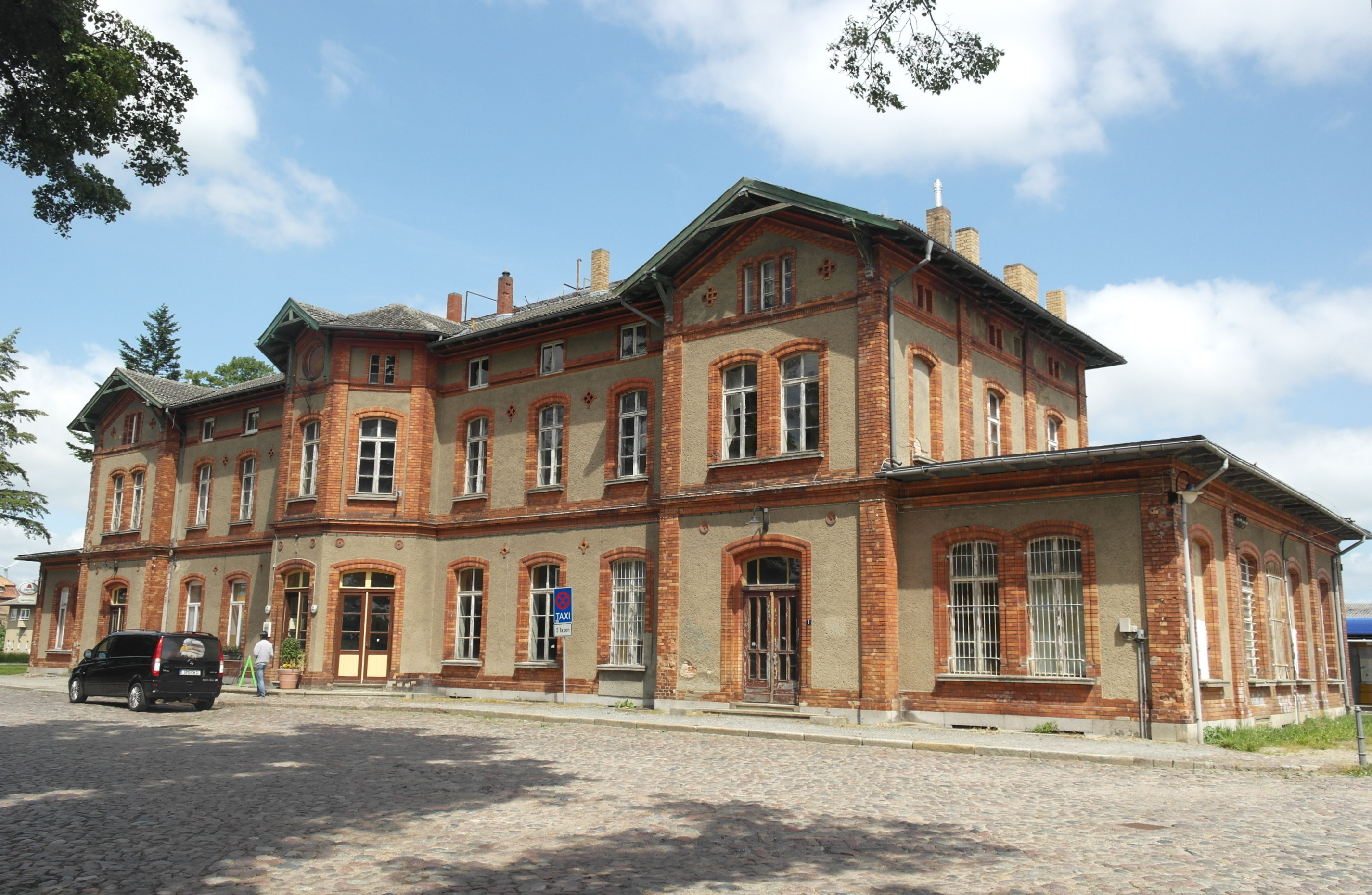 Bahnhof Reuterstadt Stavenhagen, Baudenkmal, Blick von Südosten